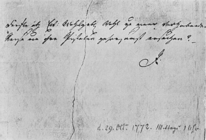 Billet, mit dem das Urbild des jungen Werthers, Jerusalem, Kestners Reisepistolen erbat, ist im Original im Goethe- und Schillerarchiv in Weimar erhalten.